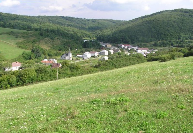 DescriptionCelkový pohľadDate25 June 2006SourceOwn workAuthorAndrej BelovežčíkPermission (Reusing this file) anoCelkový pohľad